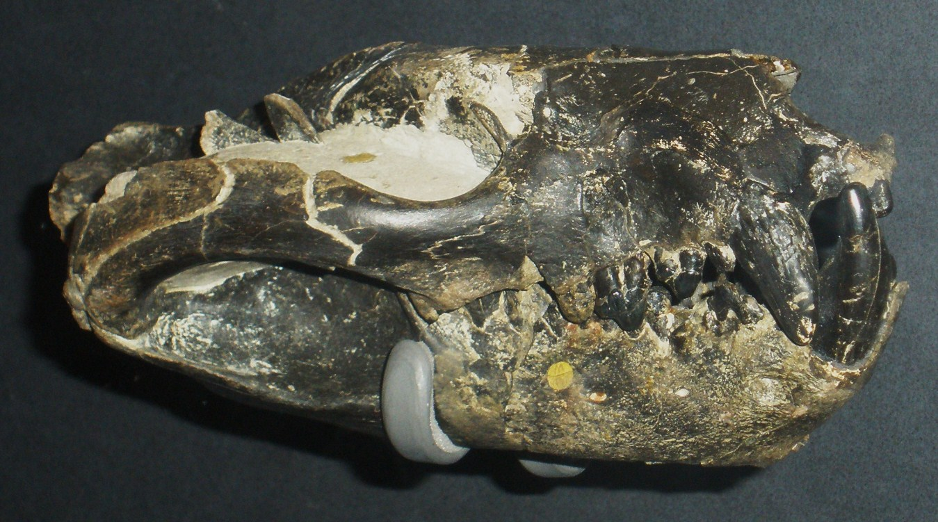 Fossil of Borhyaena, an extinct mammal-- Took the photo at Natural History Museum, London